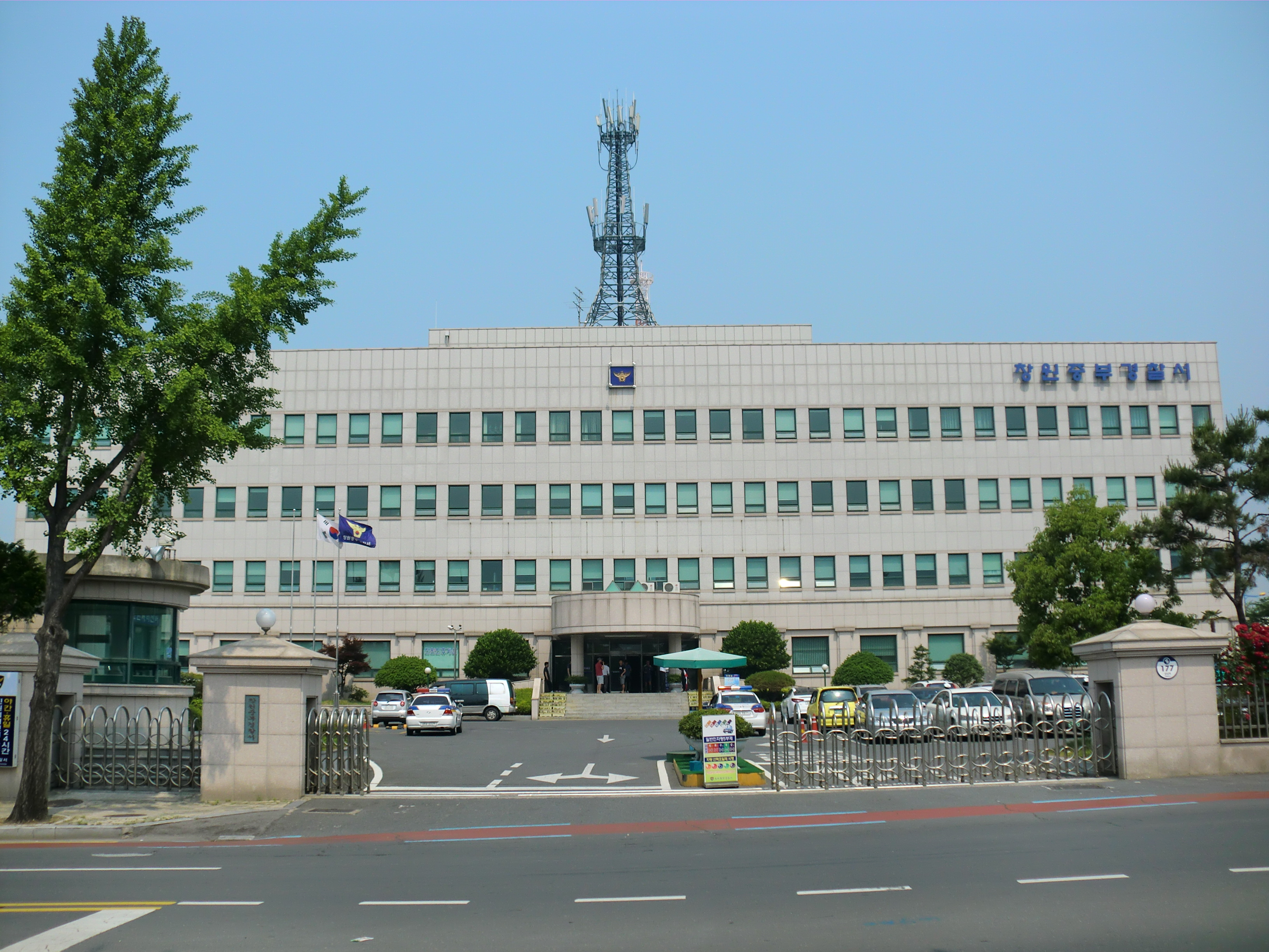 경상남도 창원시에 있는 창원중부경찰서